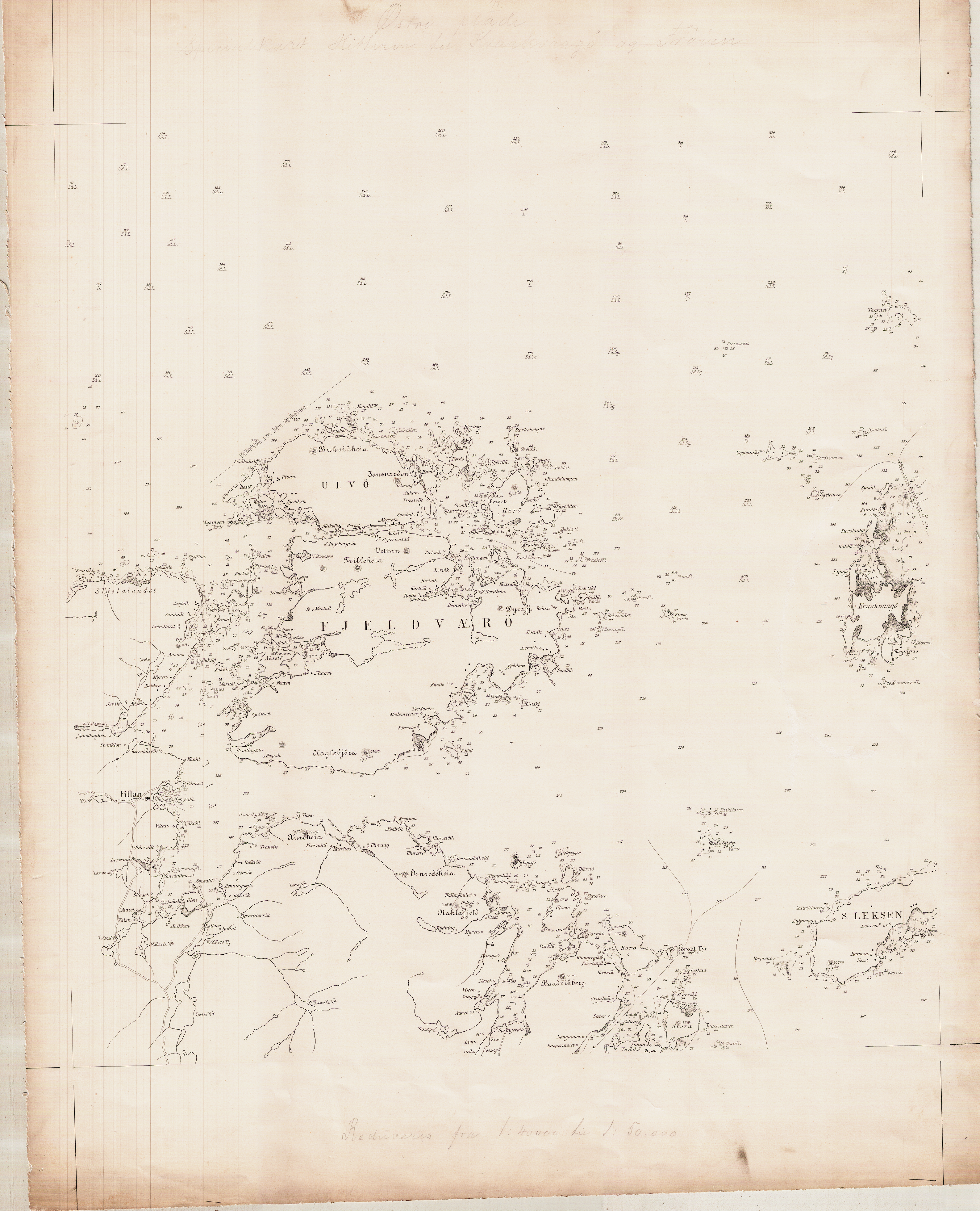 Sjøkart over Hitra, Frøya og Kråkvåg, fra ukjent årstall. Trykket i målestokk 1:50 000. Original kartstørrelse ca 58 x 72 cm. Et eksemplar befinner seg hos Statens kartverk Sjø i Stavanger.